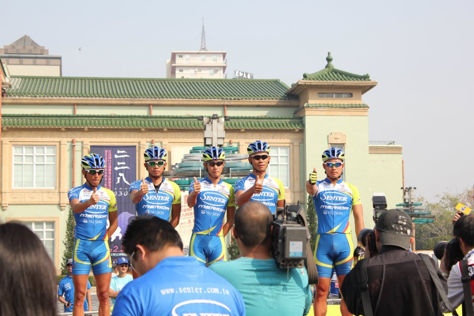 中文（台灣）: 申騰美利達在2012高雄市站